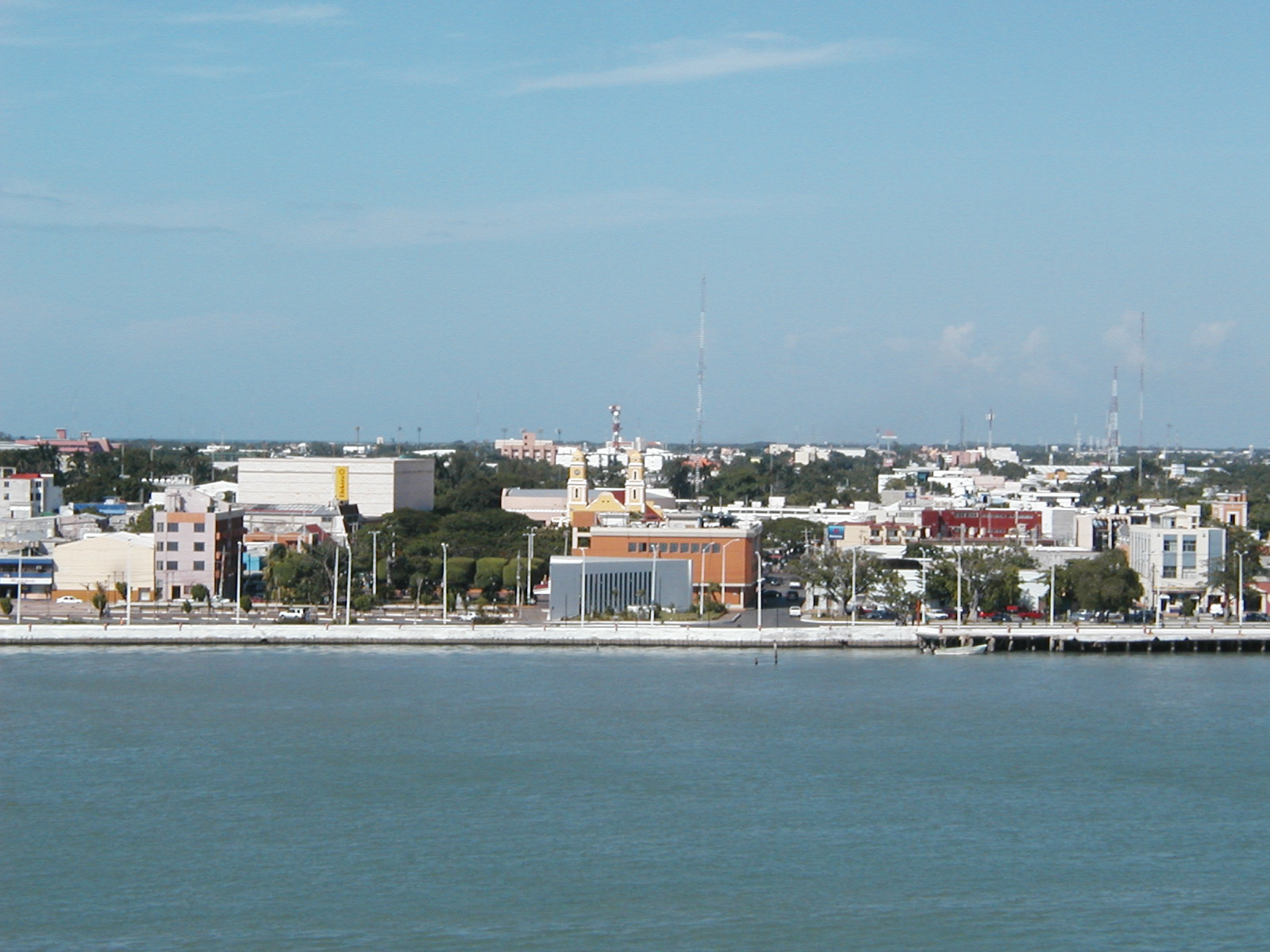 Imagen aérea Ciudad del Carmen